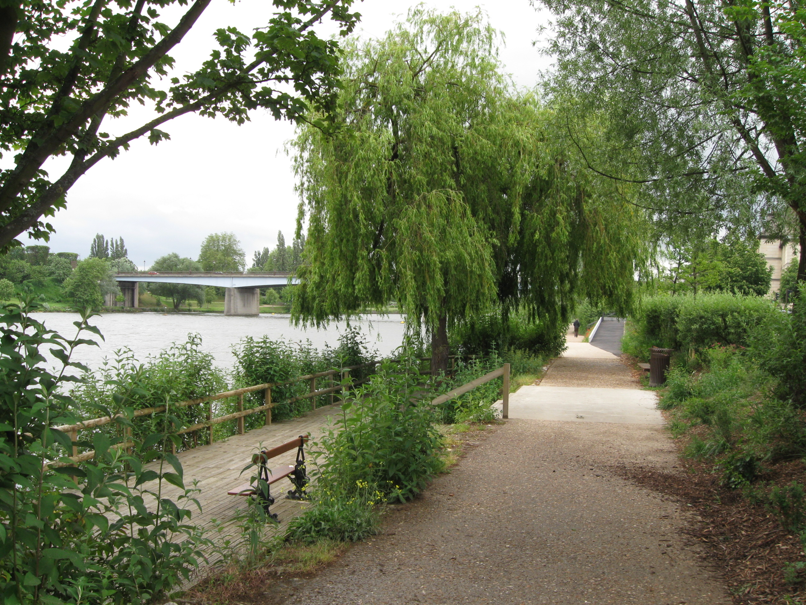 Ceinture verte de l'agglomération mantaise, au niveau du quai de la Tour à Mantes-la-Jolie